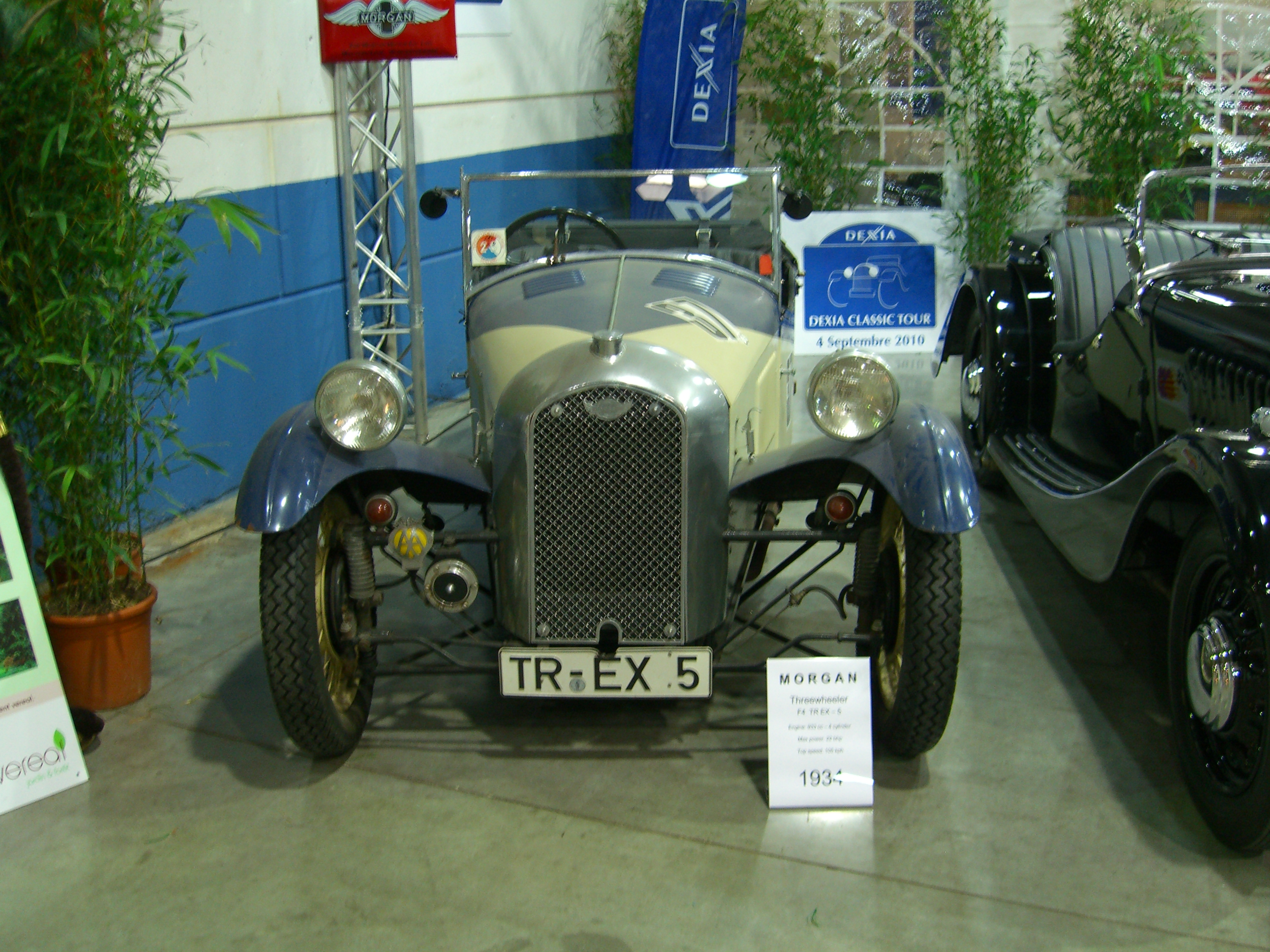 Morgan F4, Bj. 1934 auf einem Autojumble in Luxembourg, März 2010